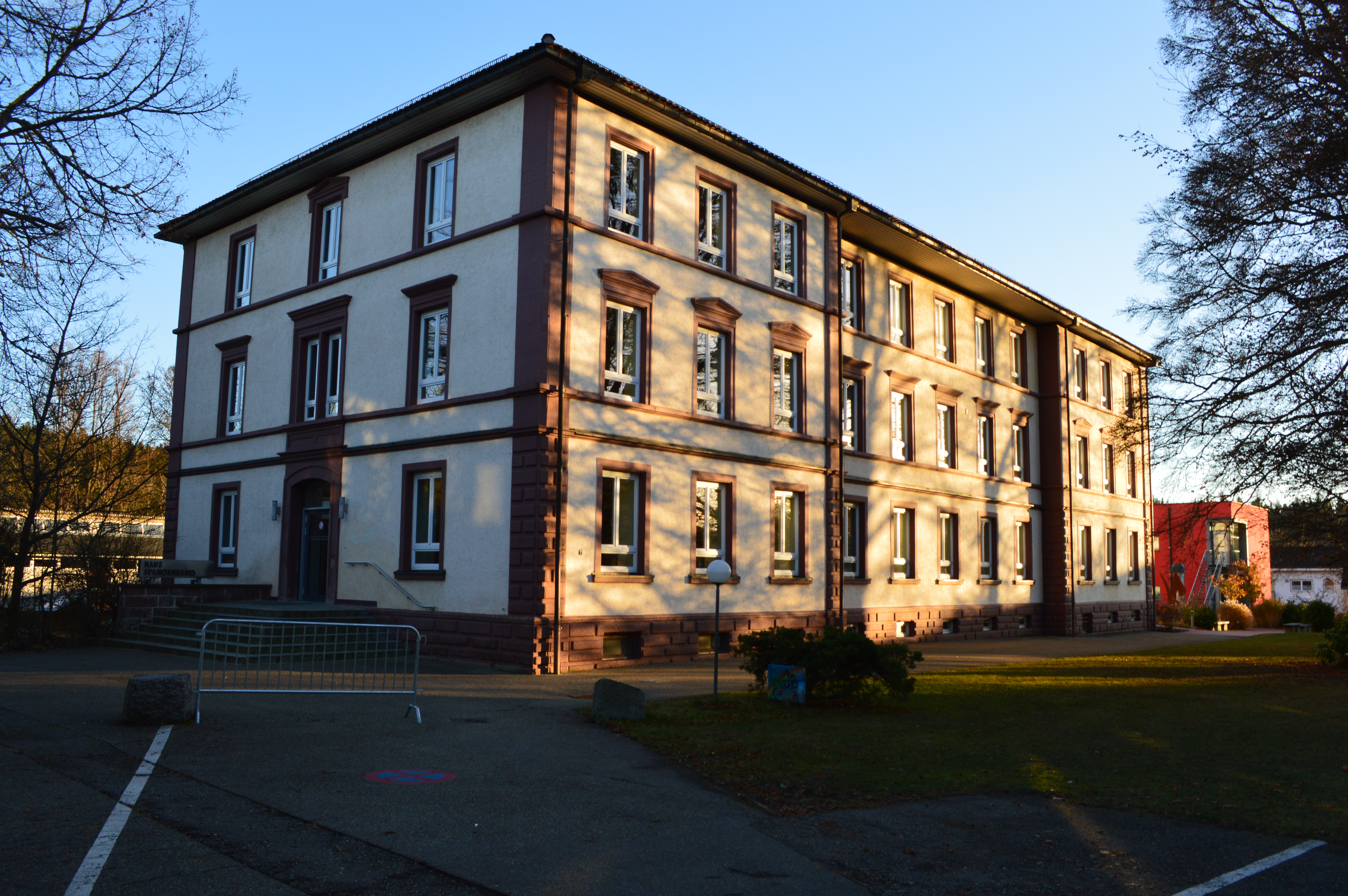 Königsfeld Mönchweilerstraße 7 Herbst 2016